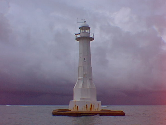 Farol da Pedra Seca, Cabedelo, estado de Paraíba, Brasil.